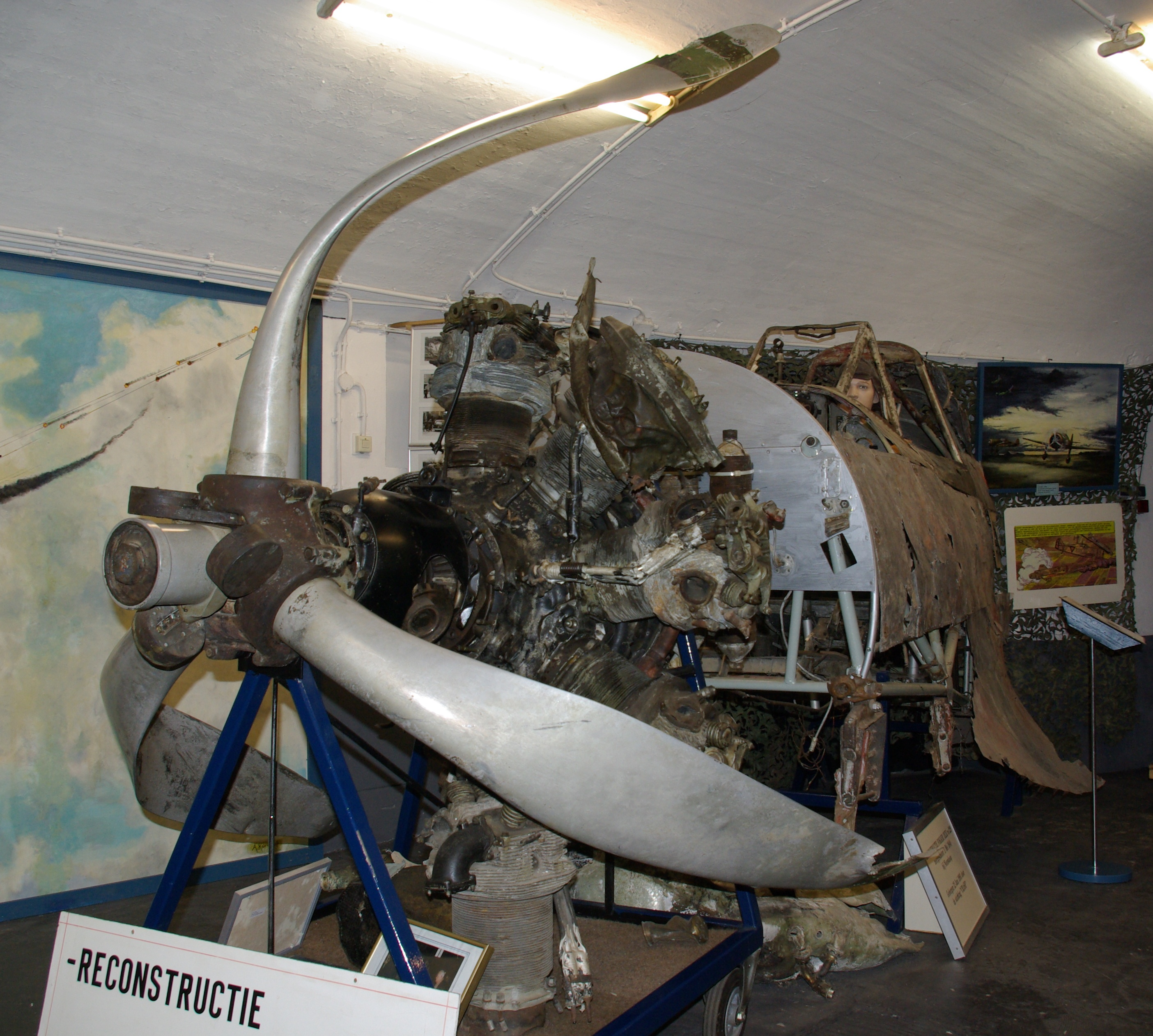 Museum CRASH '40-'45 in het Fort bij Aalsmeer.